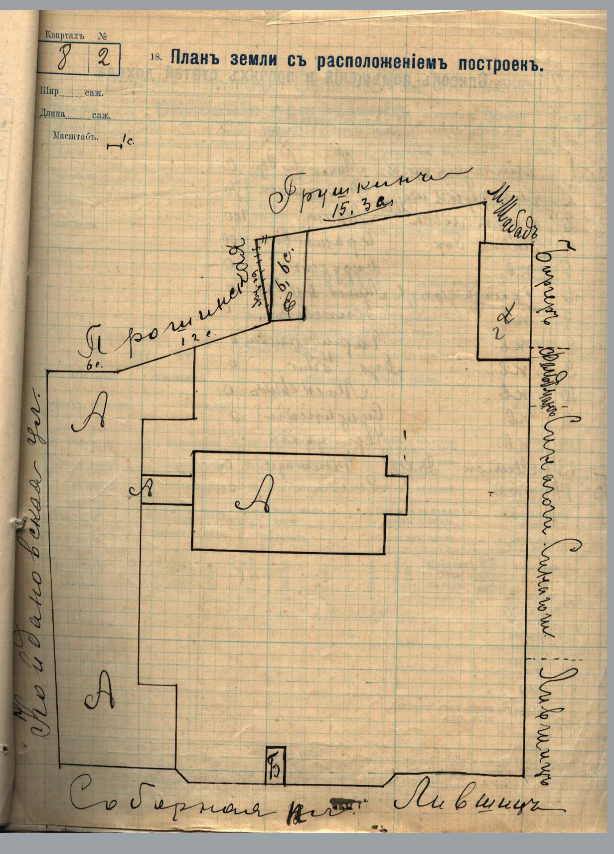 План мінскай сядзібы Пшаздзецкіх. Будынак “А” – у гэтым будынку сядзібы на рагу Койданаўскай вуліцы было размешчана Мінскае духоўнае вучылішча.